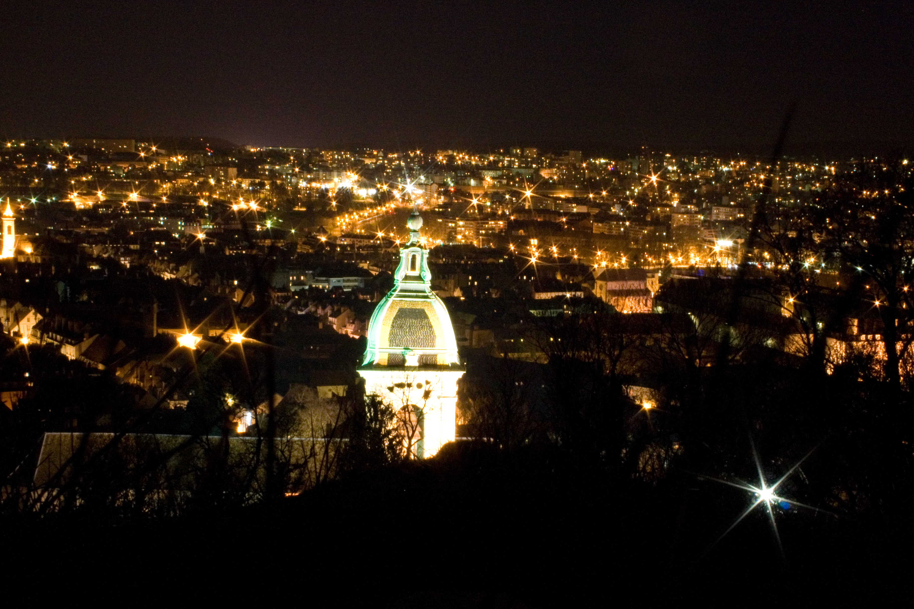 Besançon (France) de nuit depuis la citadelle